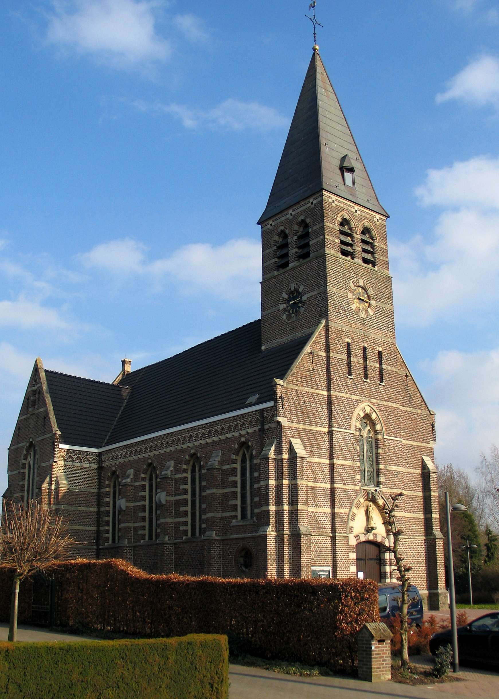 Sint-Brixiuskerk te Schalkhoven, België